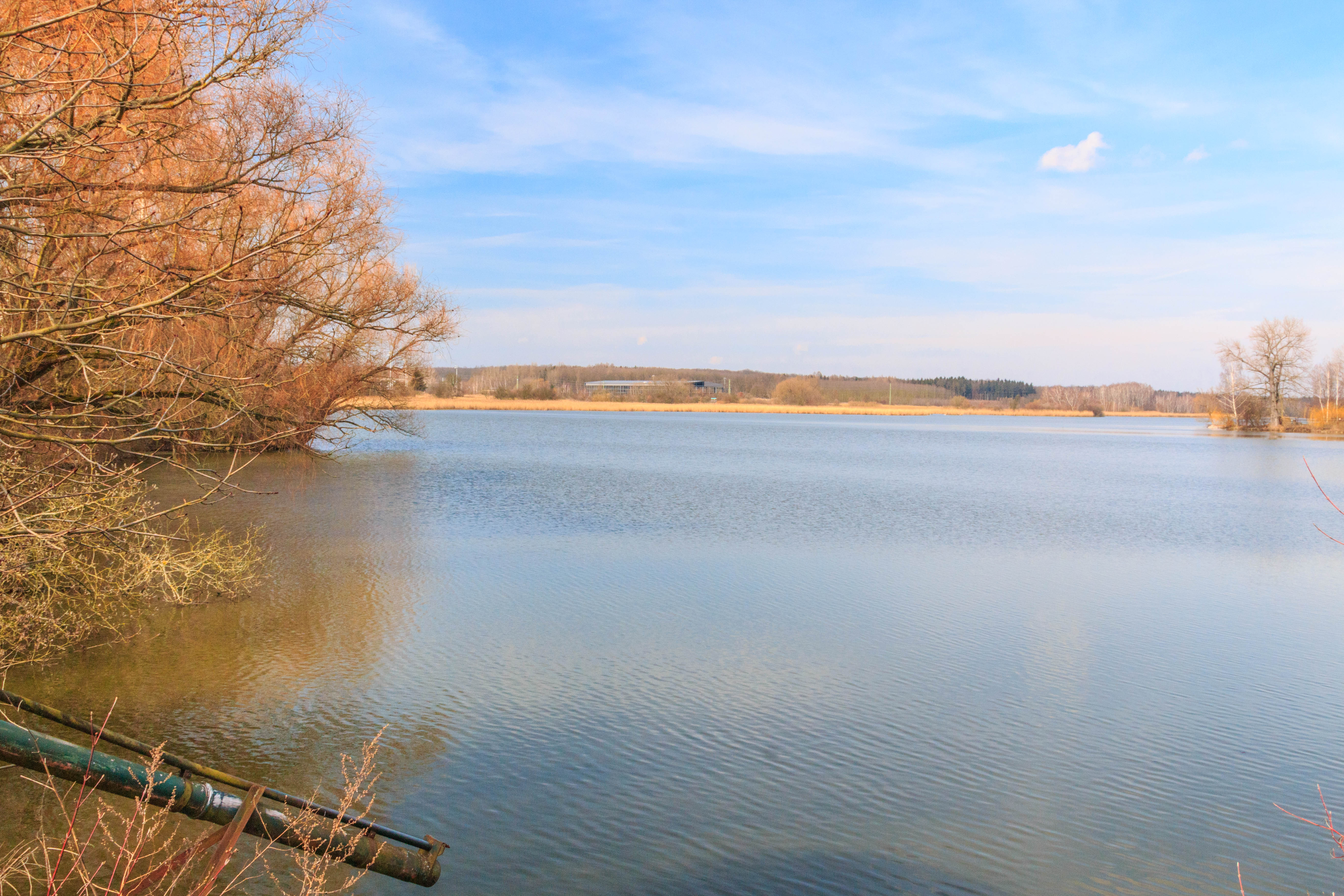 Starochlumecký rybník Project: Vodstvo.